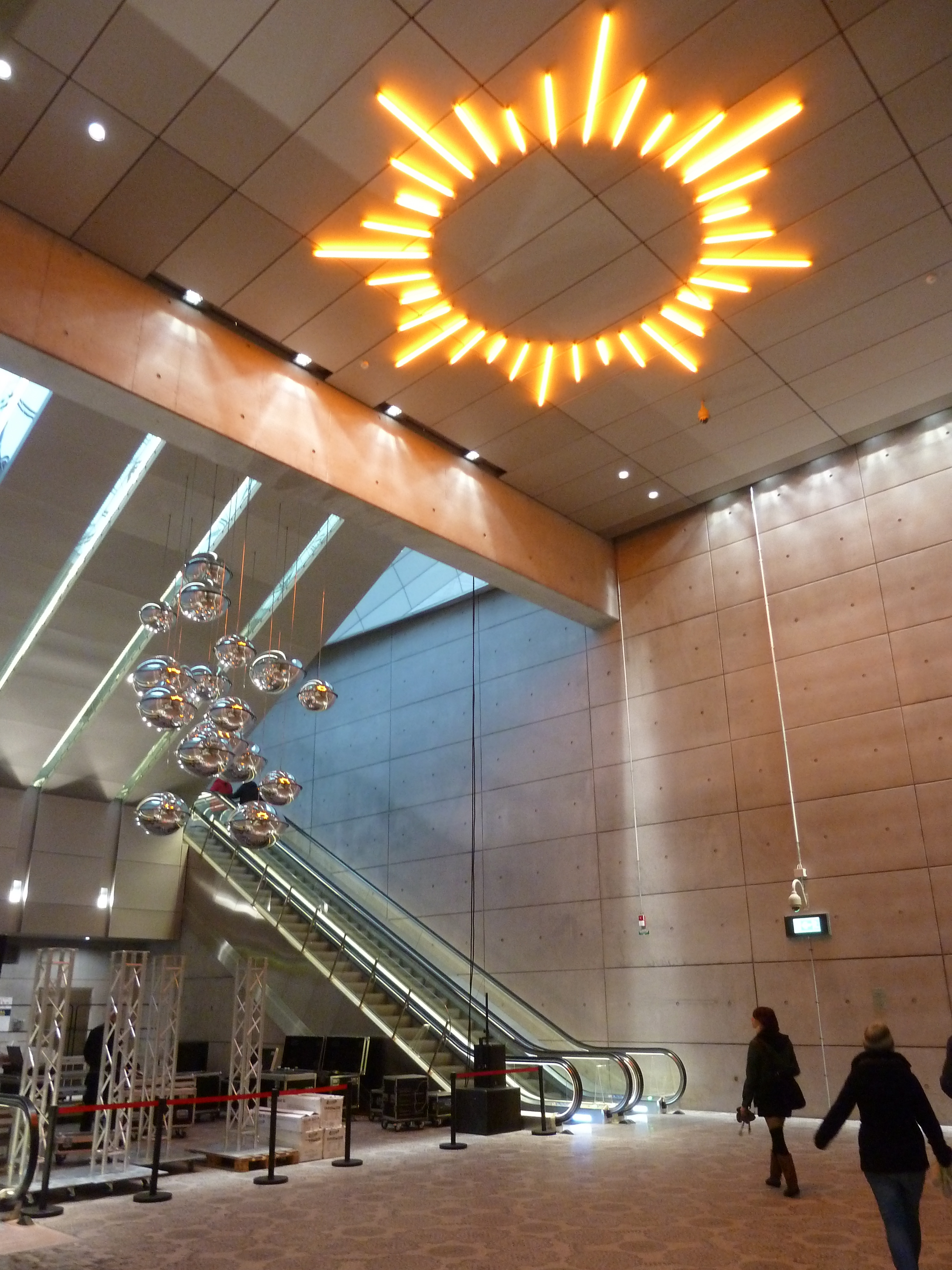 Triangelns hållplats